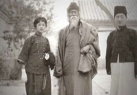 Три знаменитых поэта: Линь Хуэйинь, Рабиндранат Тагор, Сюй Чжимо